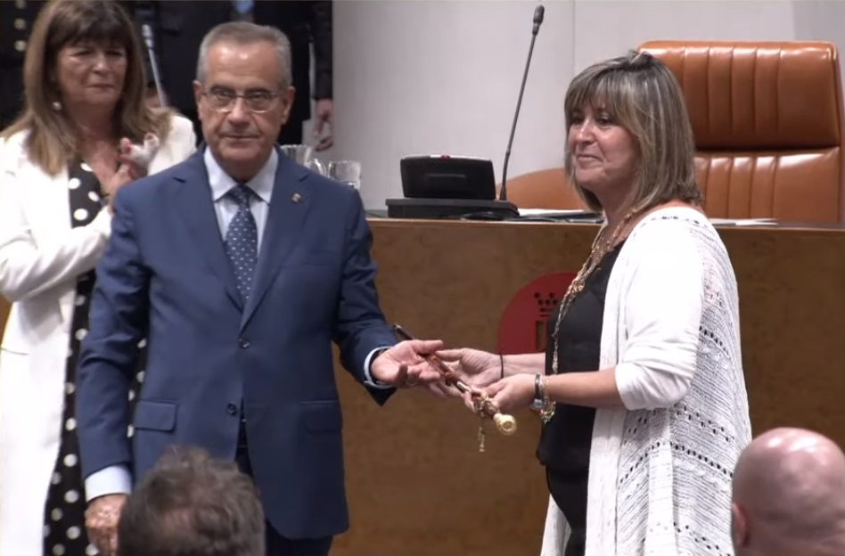 Ple de constitució de la Diputació de Barcelona mandat 2019-2023